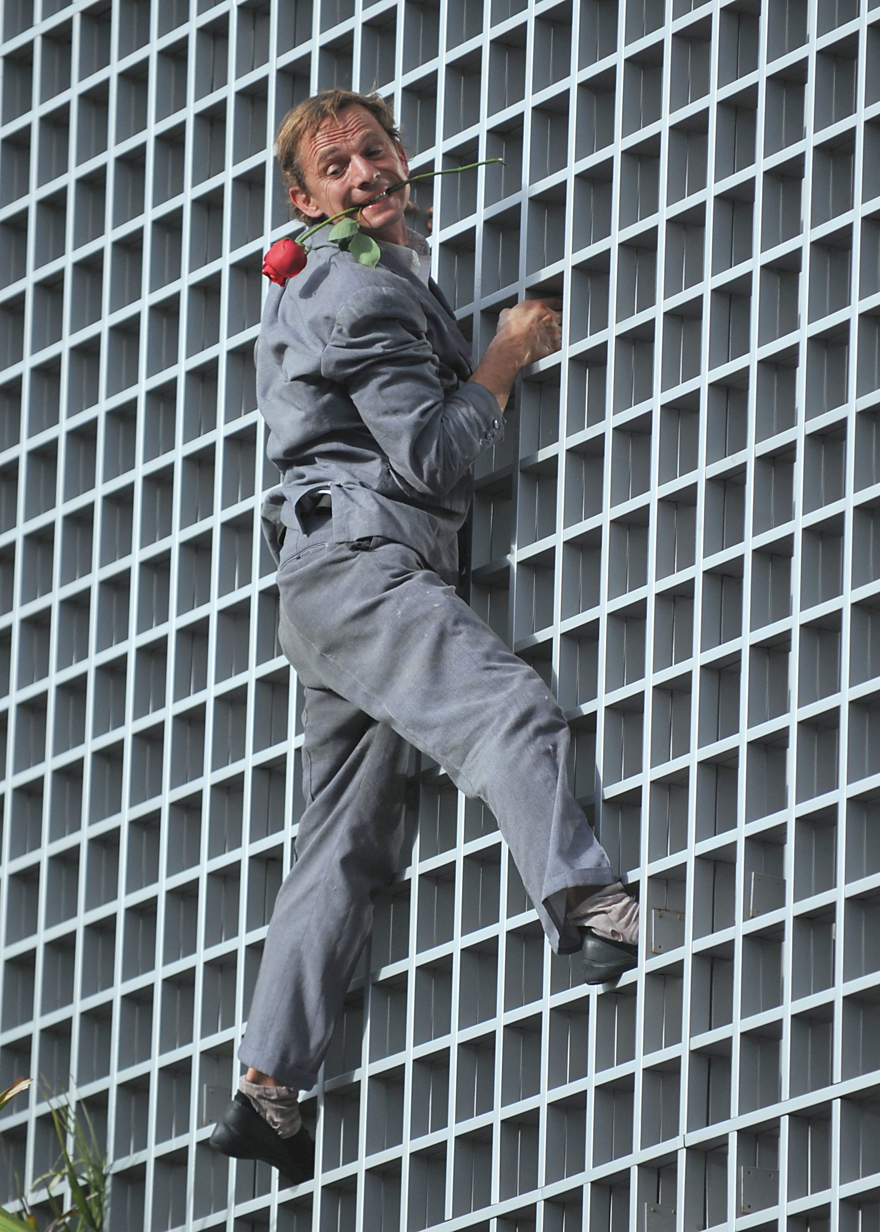 Le grimpeur français Antoine Le Menestrel, lors des commémorations de l'année France-Brésil